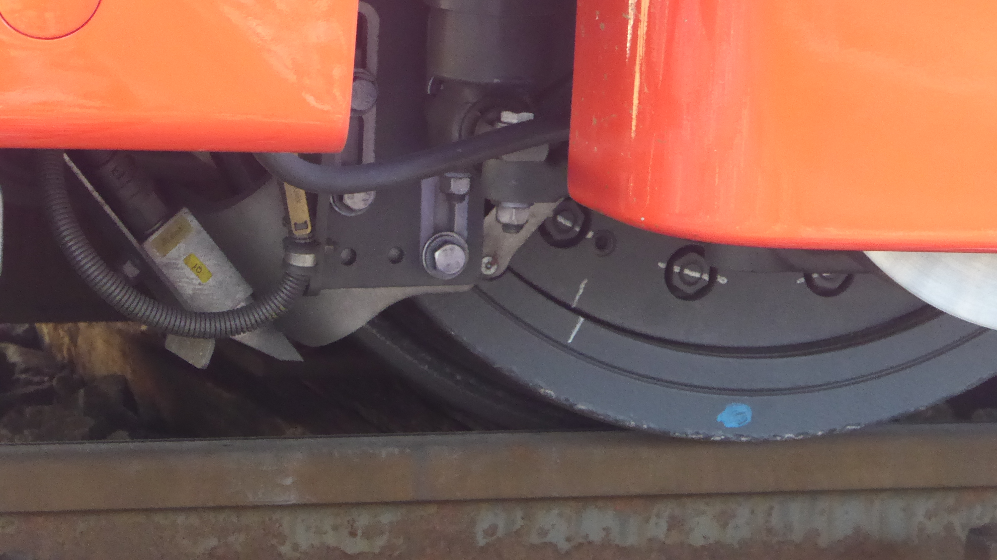 Sandstreuvorrichtung an der vordersten Achse eines ABe 8/12 „Tango“ der Appenzeller Bahnen (AB)